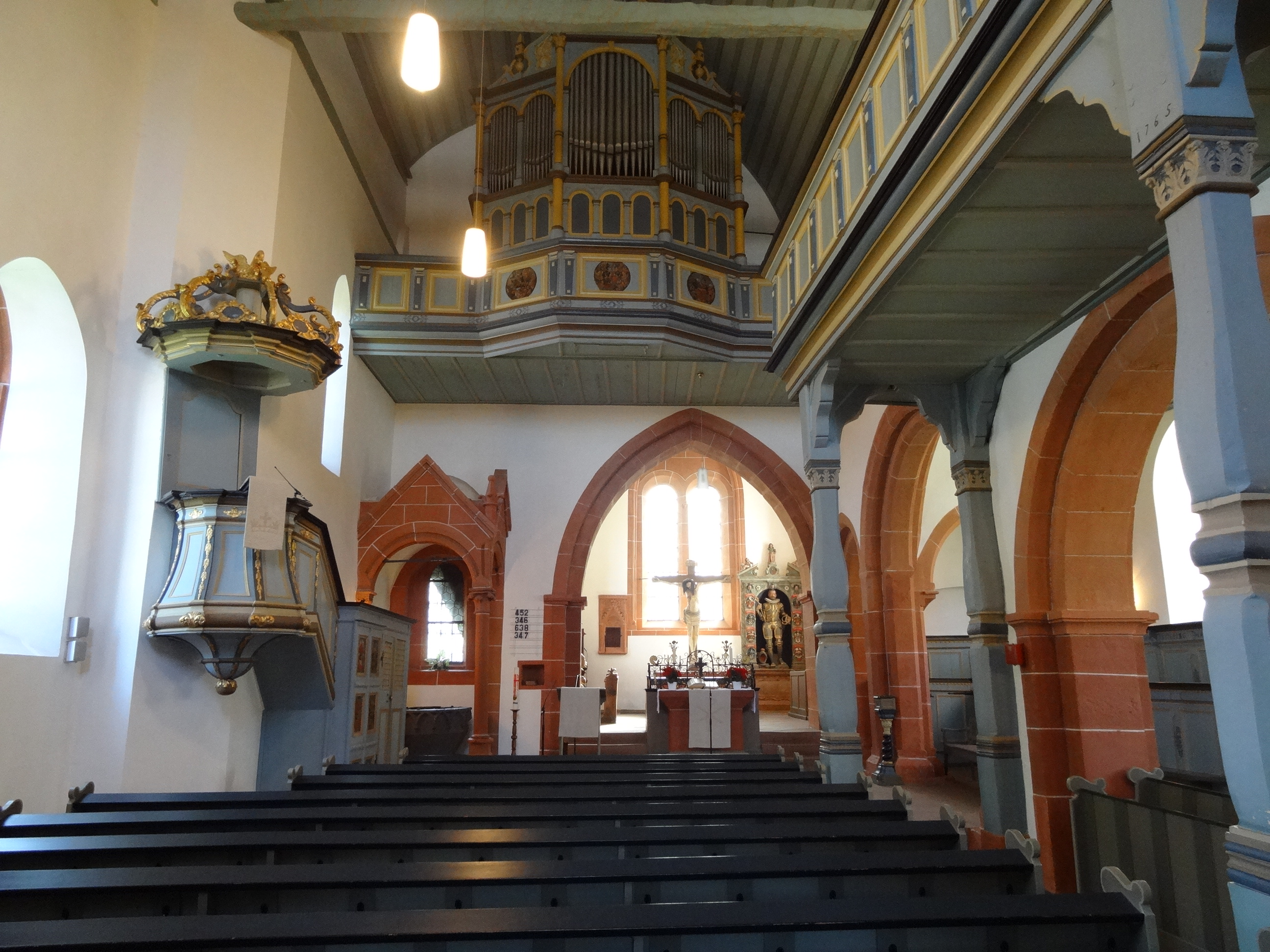 Evangelische Pfarrkirche Münzenberg